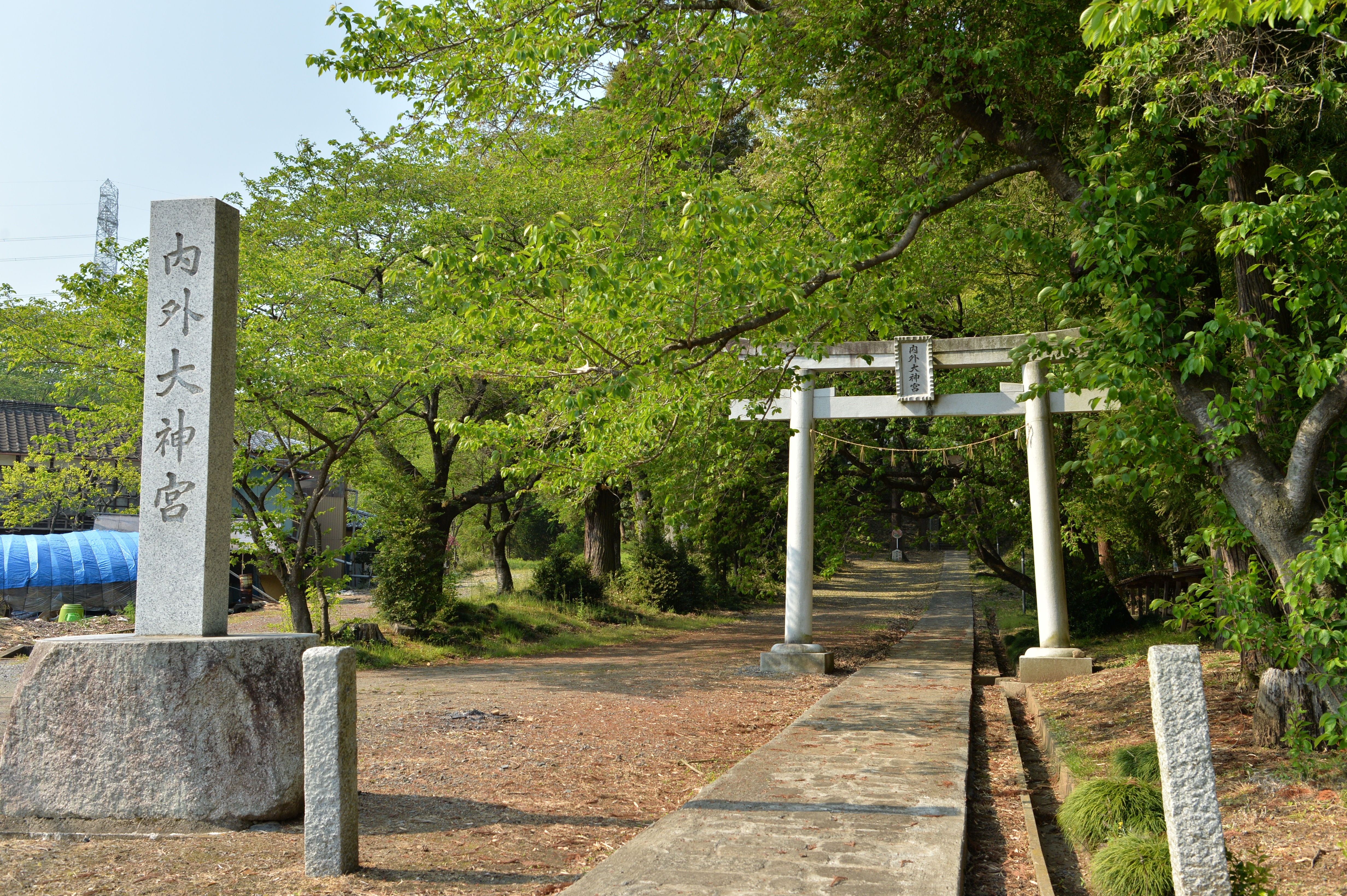 内外大神宮の鳥居。茨城県筑西市小栗に所在。